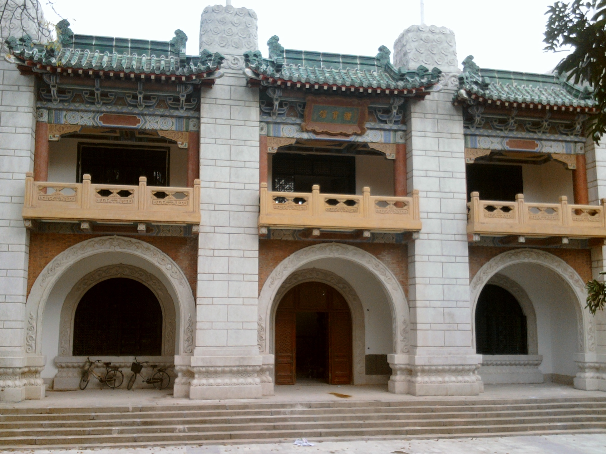 國立中山大學體育館。